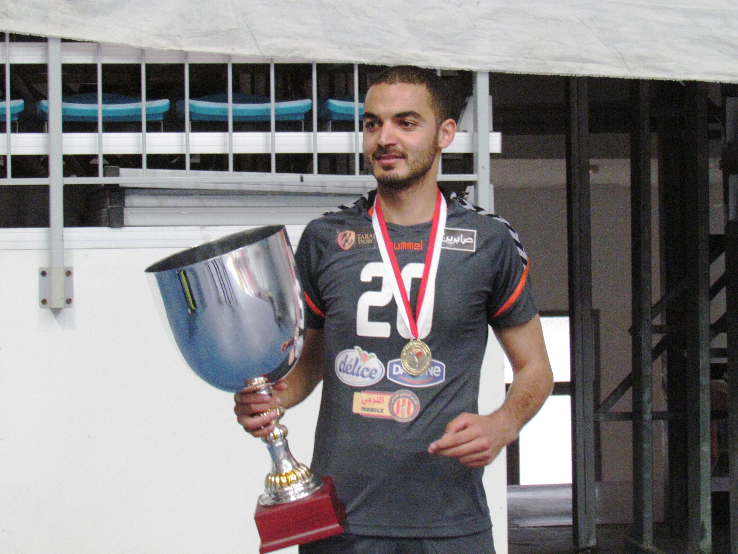 Saddem Hmissi avec le trophée du championnat de Tunisie de volley-ball 2017-201